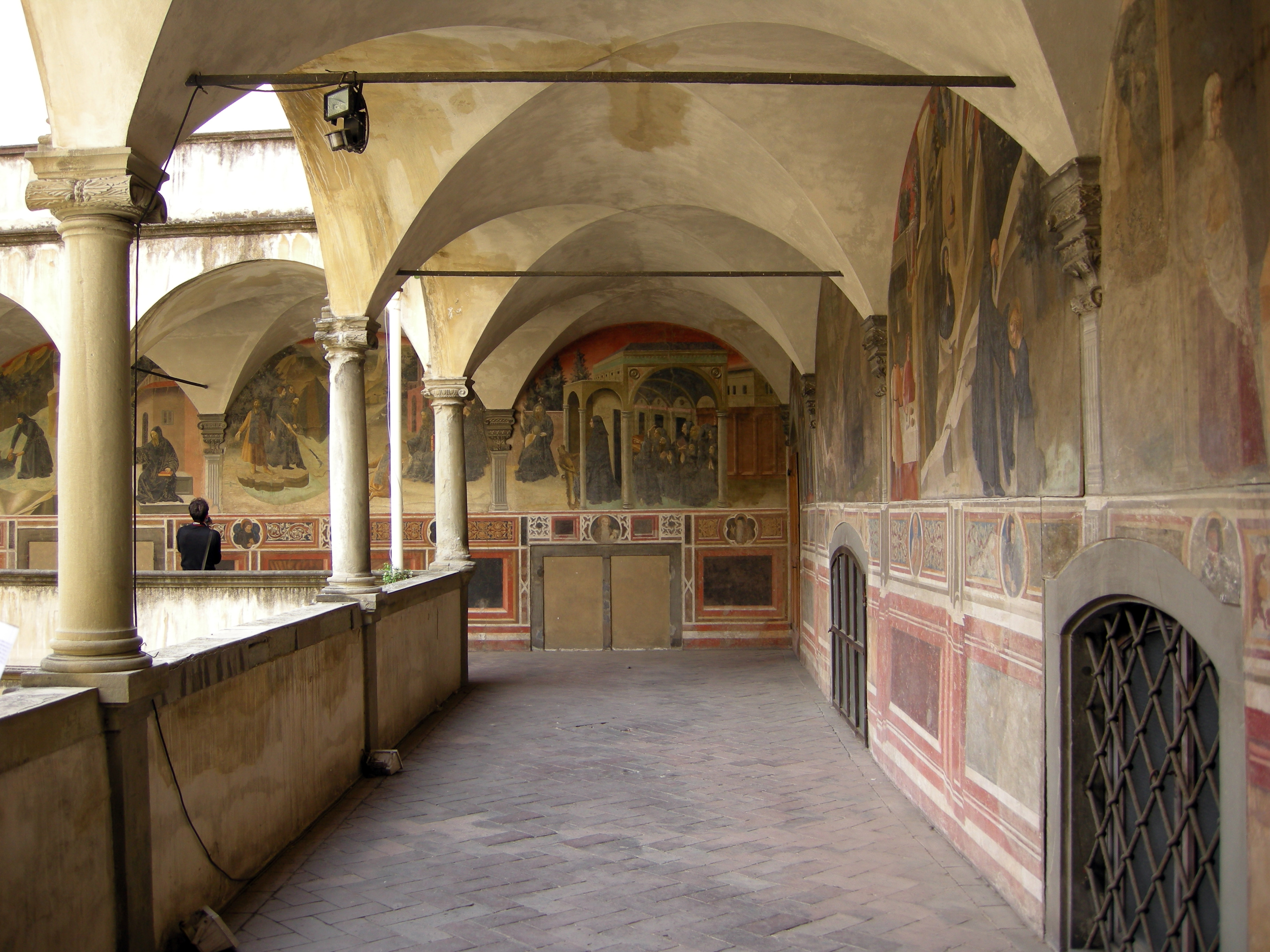 Chiostro degli aranci - Firenze